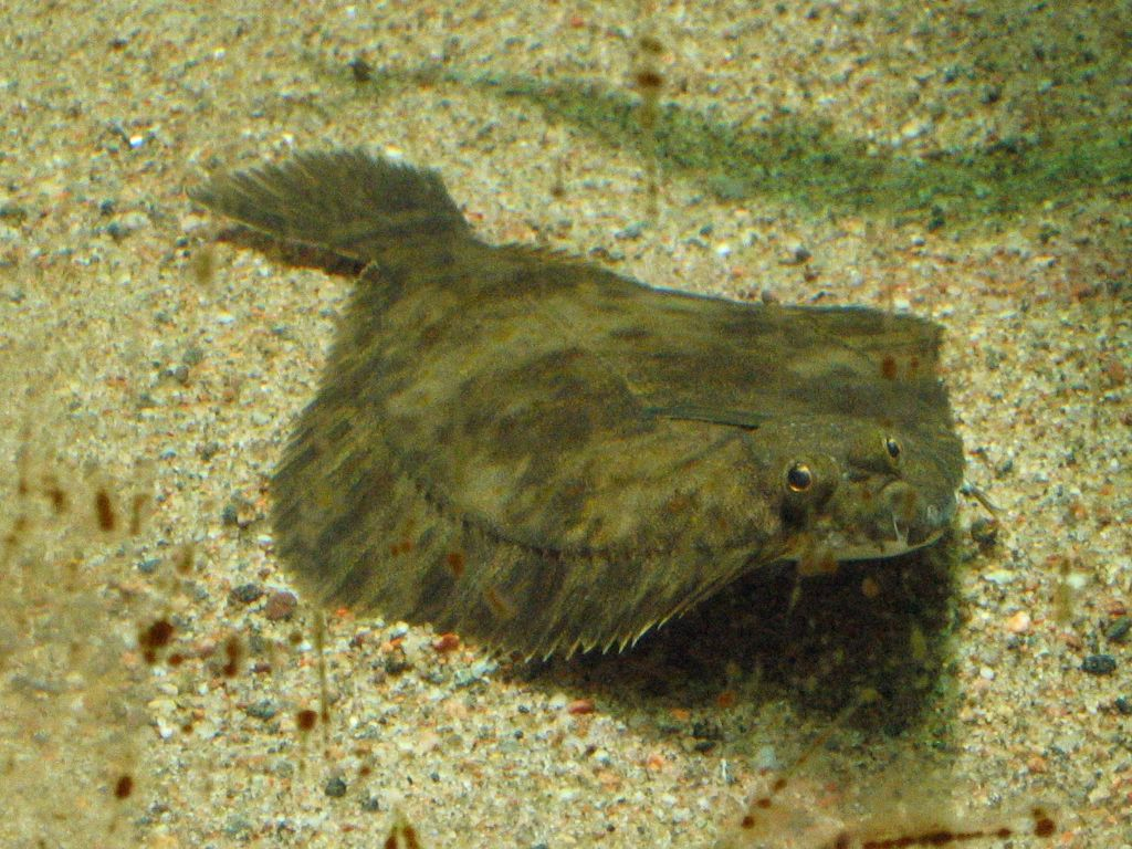 En flundra (skrubbskädda) fotograferad i akvarium, Blåmusslans naturum, Kasnäs, Finland.